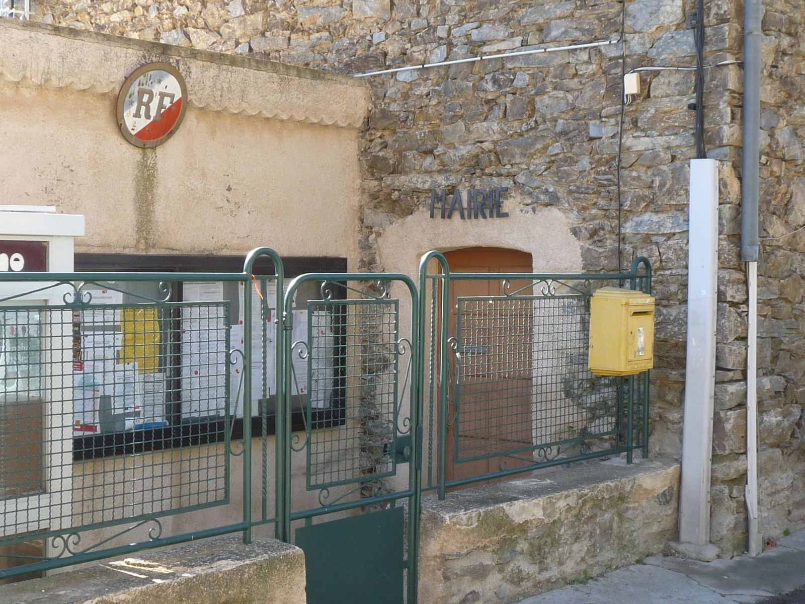 Mairie de Nohèdes , Pyrénées-Orientales, France